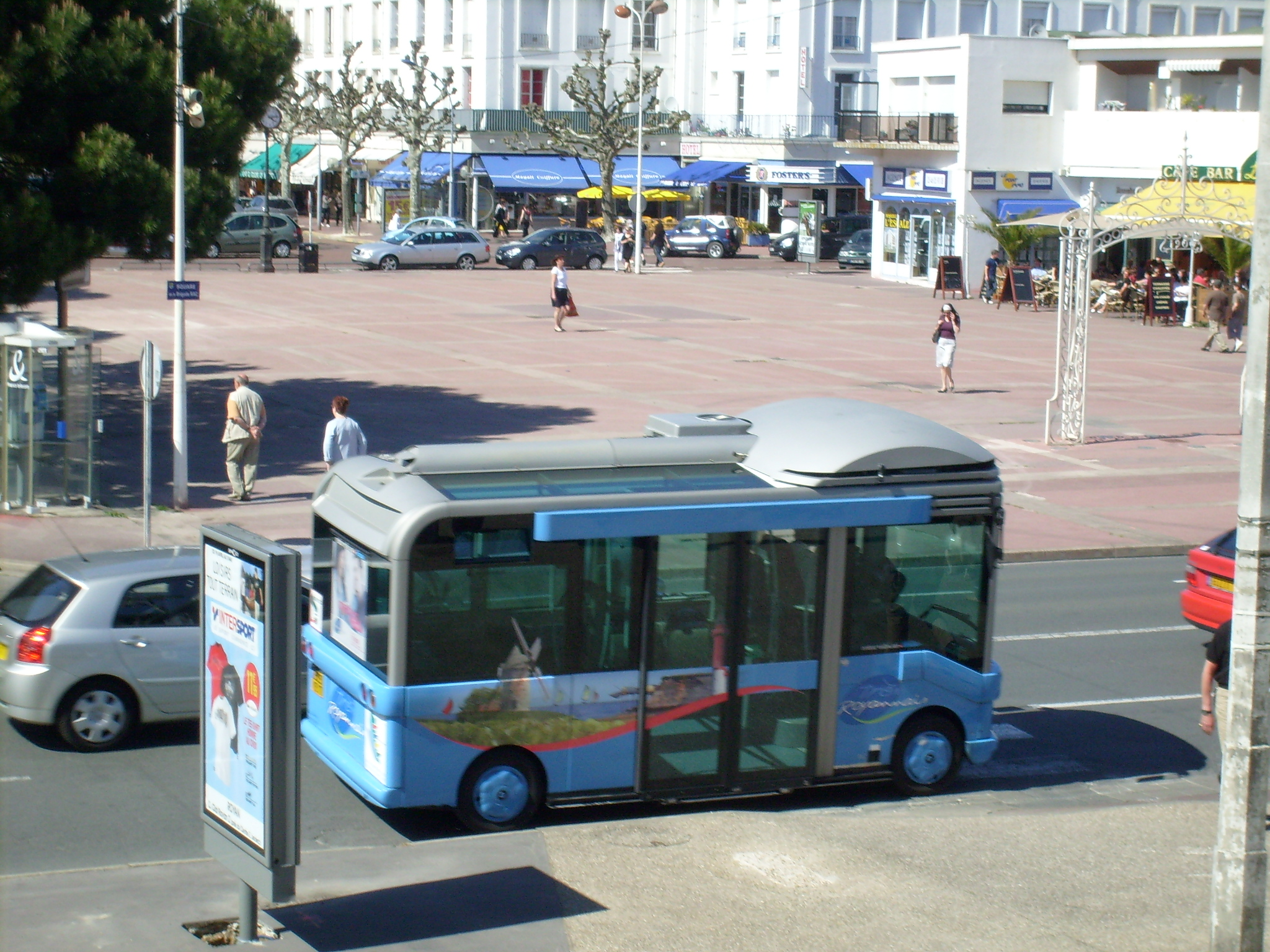 photographie du minibus de royan, par Cobber17